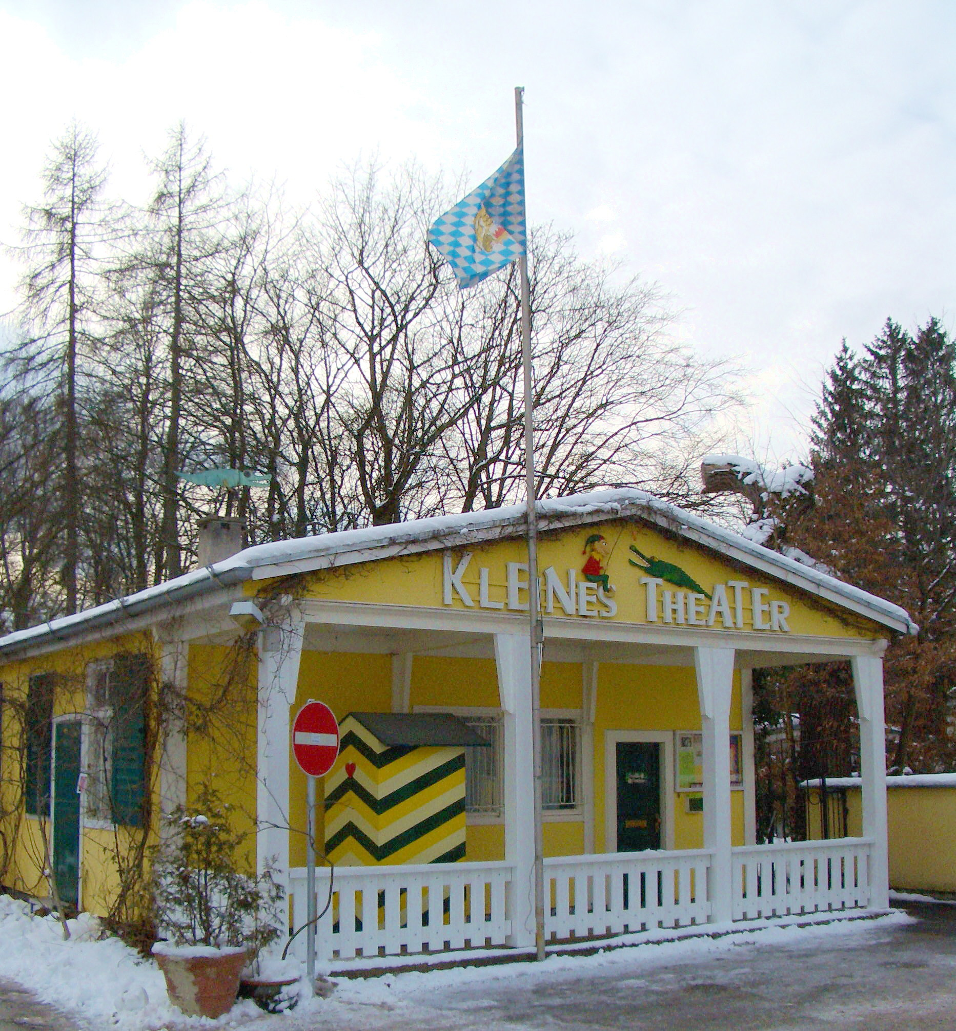 Bürgerpark Oberföhring: Ehemaliges Pförtnerhaus